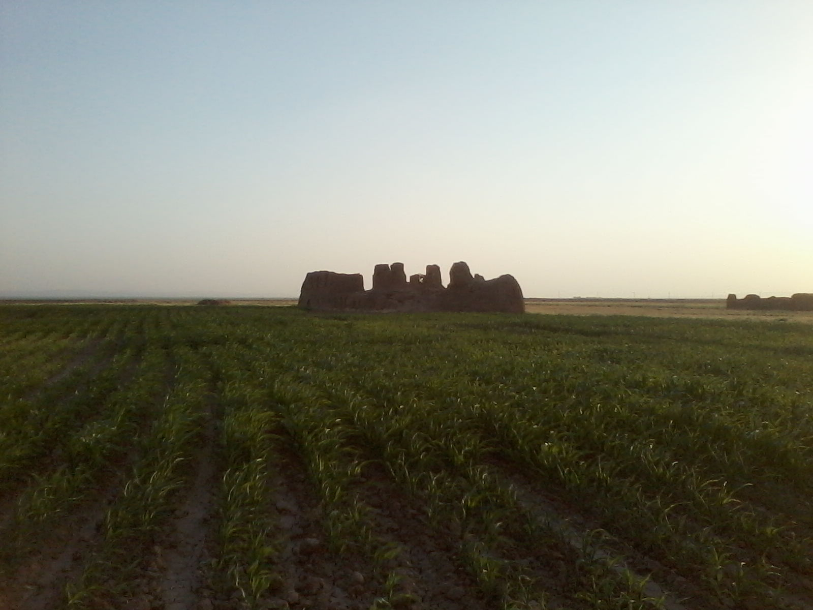 این عکس مربوط به روستای فرهاد شهرتان نیشابور می باشد که توسط خودم تهیه شده است